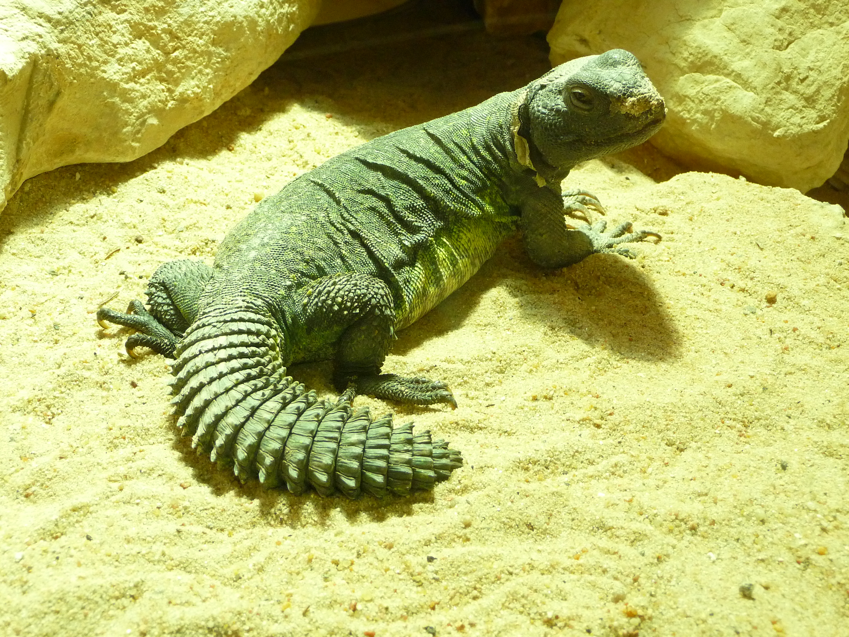 Nordafrikanische Dornschwanzagame (Uromastyx acanthinura) im Vivarium Darmstadt (Hessen, Deutschland)